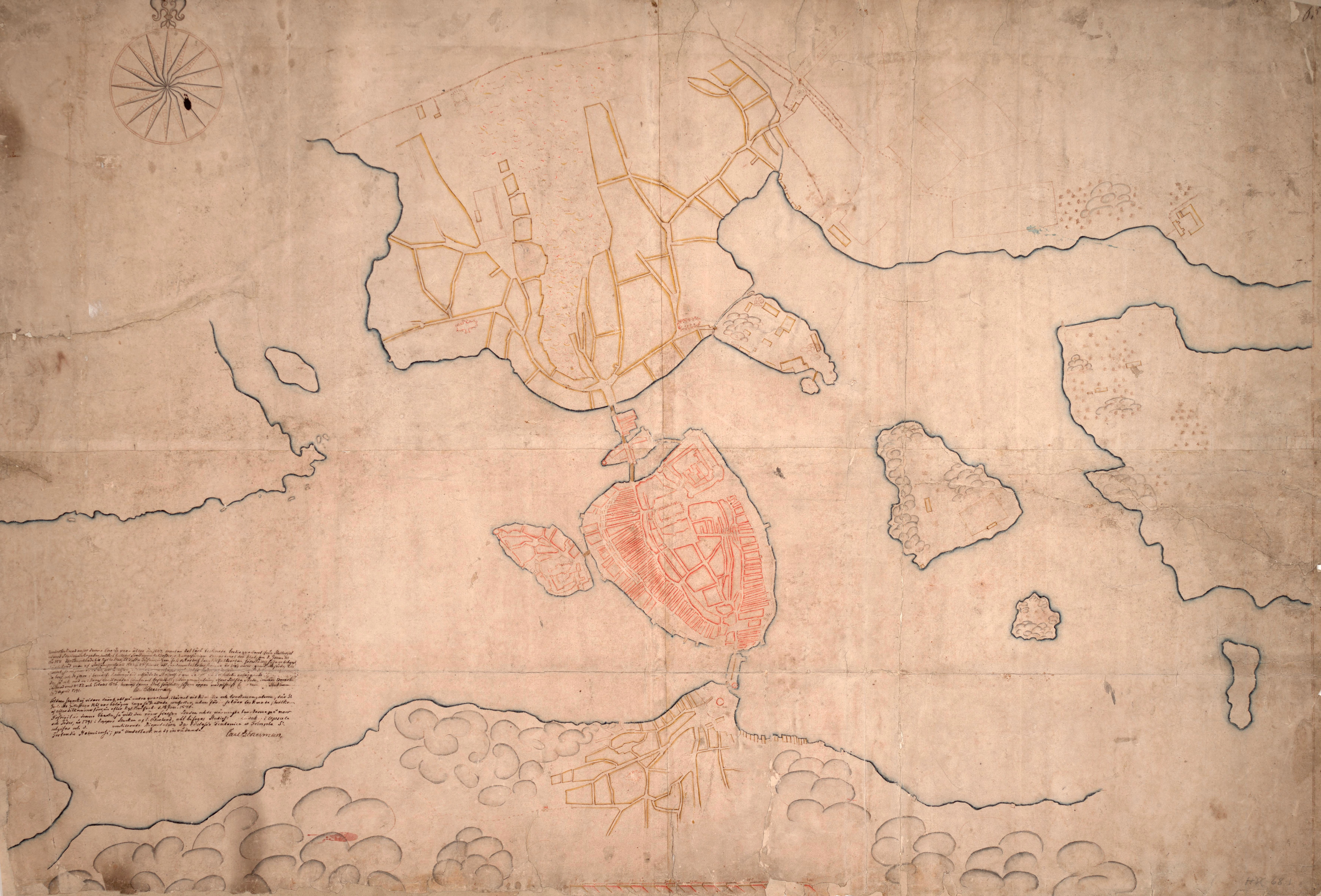 Stockholms äldsta karta visar staden före 1547, ritad på 1620-talet